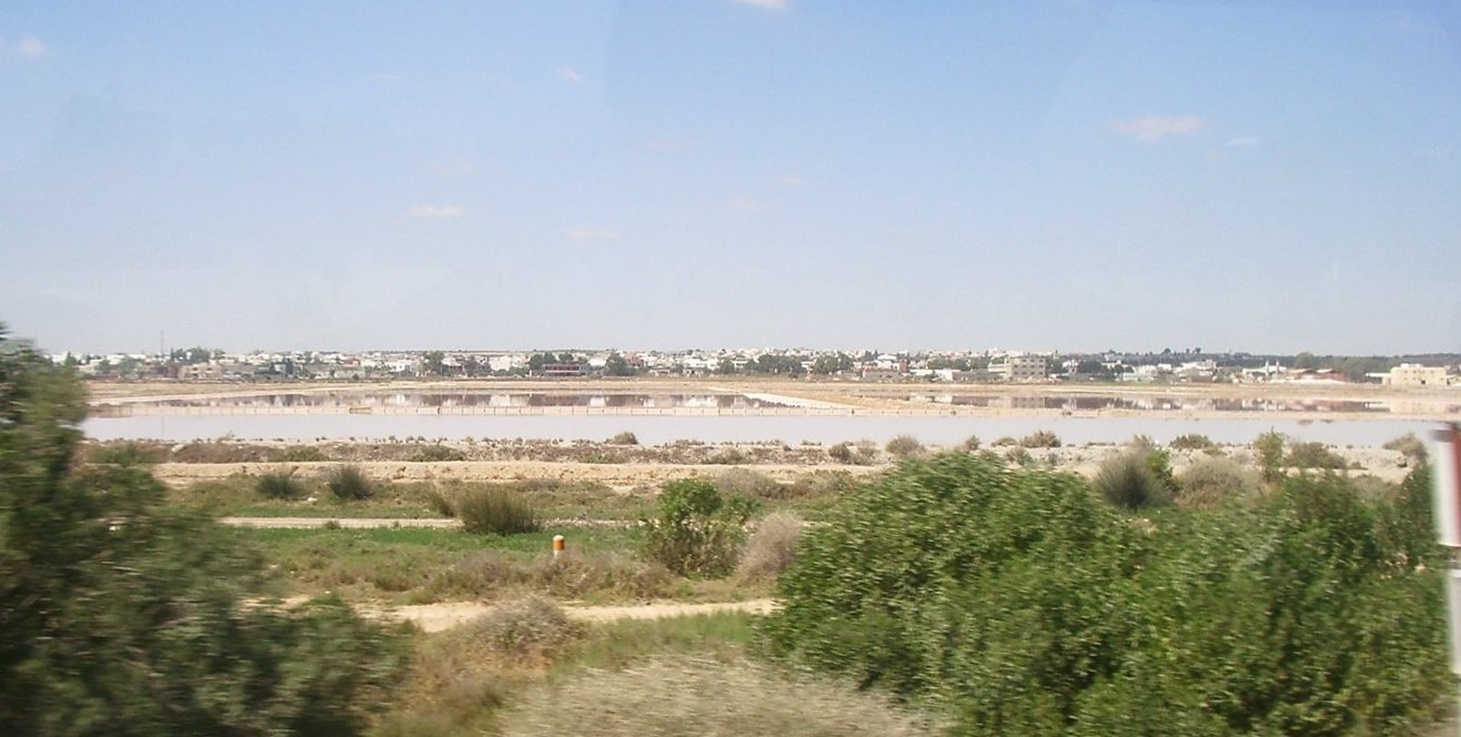 Sussa